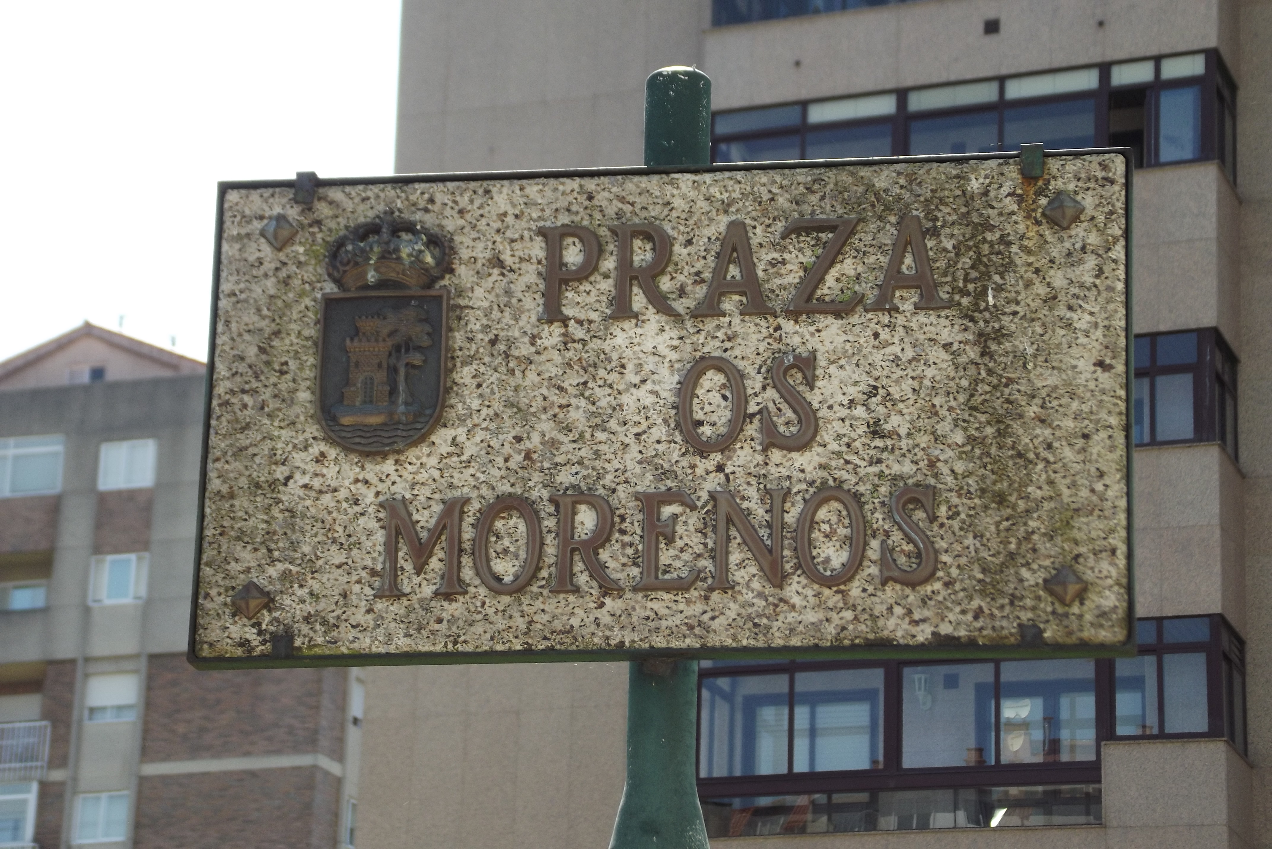 Placa co nome d'Os Morenos na praza dedicada a eles n'O Sobreiro, rueiro en Lavadores (Vigo) de onde eran naturais os irmans Oliveira, "Os Morenos" que lle daban nome ao cuarteto.